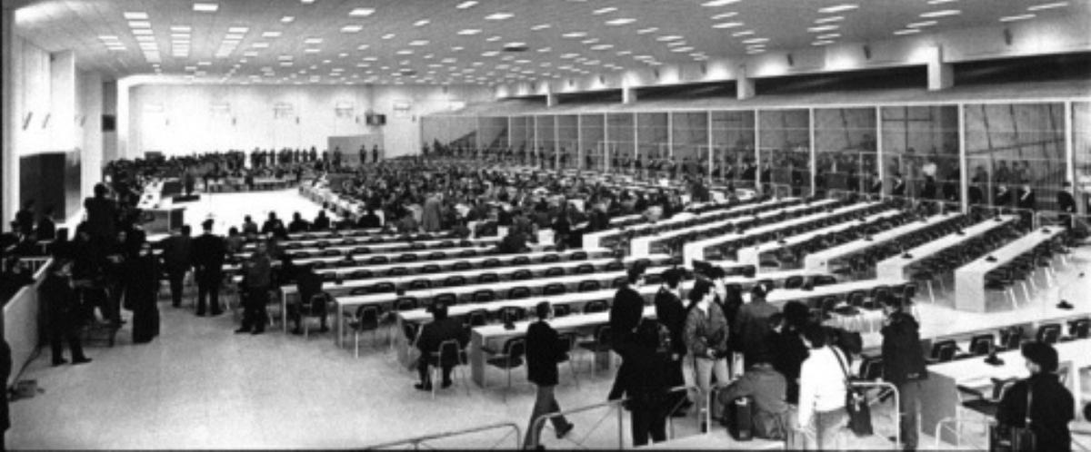 Aula bunker del carcere dell'Ucciardone di Palermo durante il maxiprocesso contro la Mafia